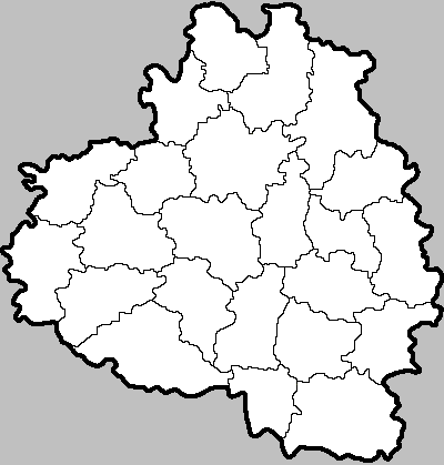 Позиционная карта Тульской области